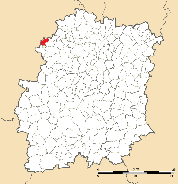 Carte de position de Boullay-les-Troux en Essonne (91)